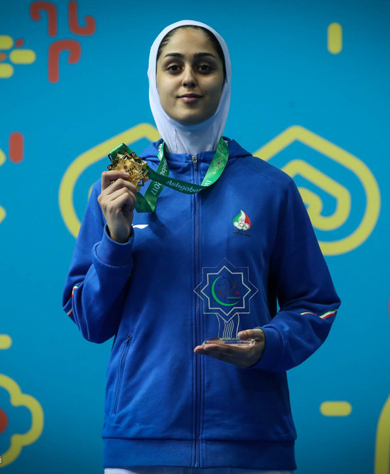 مدال طلای بازی های آسیایی داخل سالن آسیا 2017